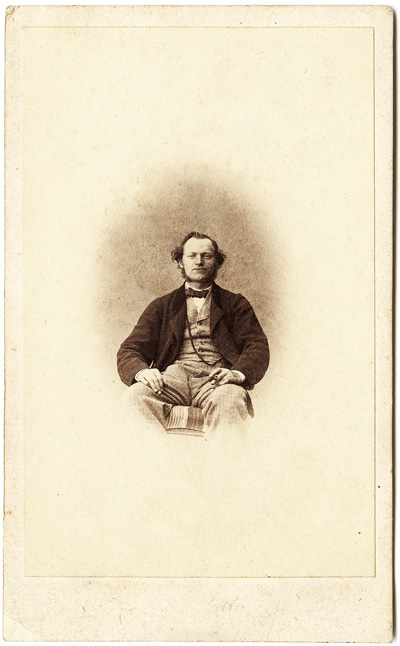 Autoportrét Ignáce Šechtla 1864 ve vizitkovém fotmátu.